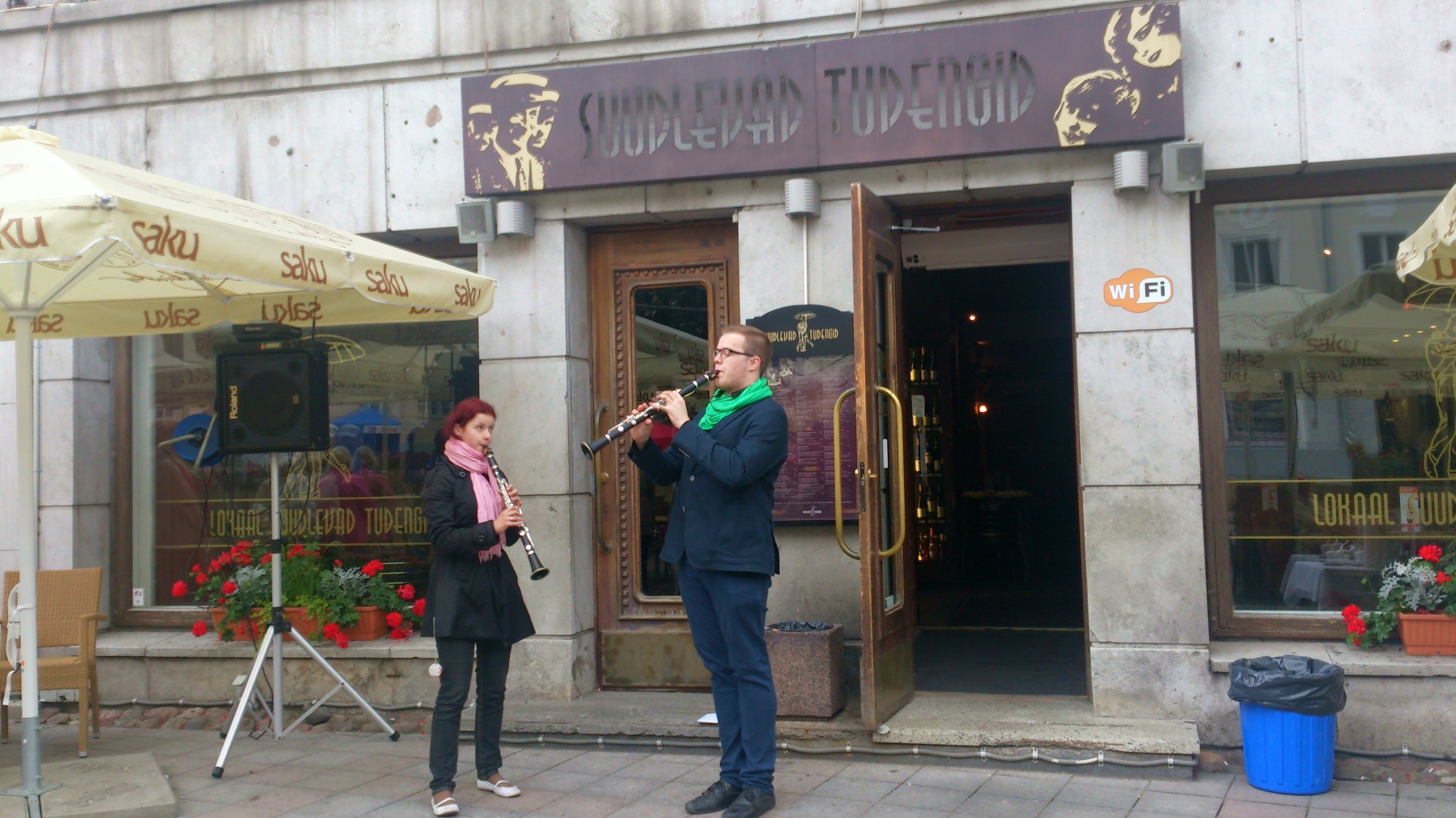 Klarnetistid Taavi Orro ja Erle Kont esinemas Tartu linna päeval, 29. juuni 2014